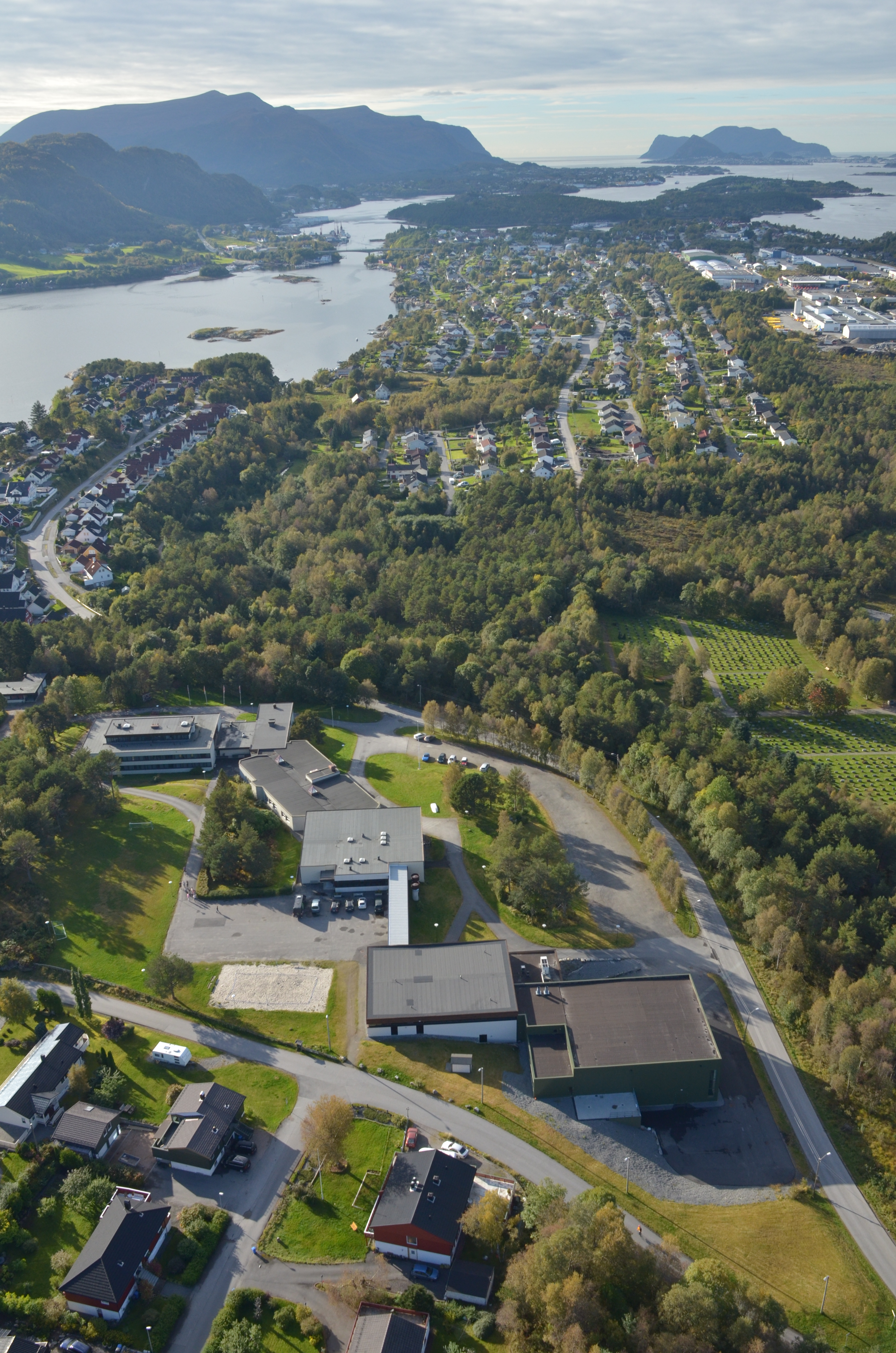 Skolebygningene til Ålesund folkehøgskole i forgrunnen, Vegsund, Sukkertoppen og Godøya i det fjerne.